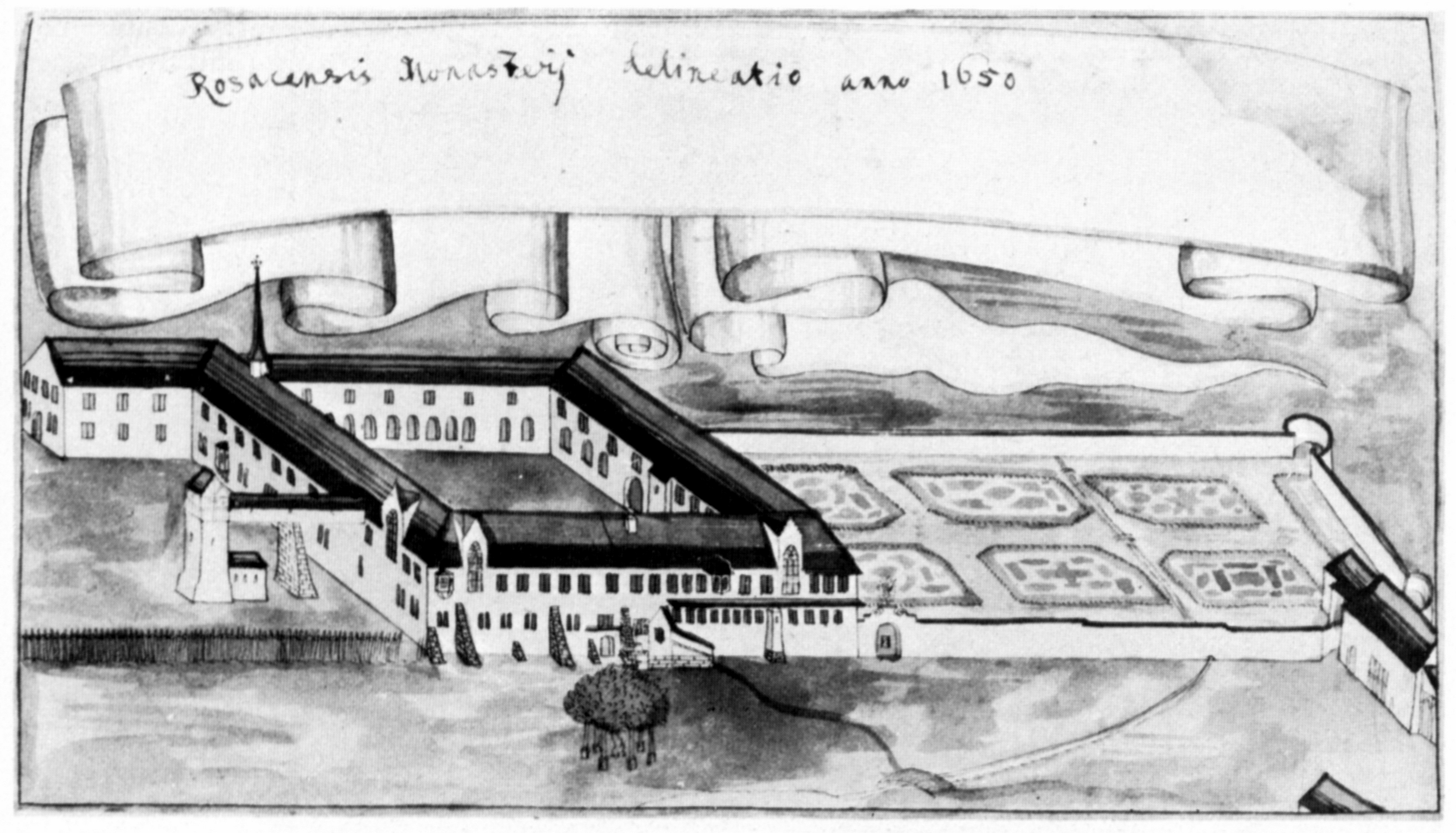 Mariaberg über Rorschach, Kt. St. Gallen, um 1650, aus: Württembergische Landesbibliothek, HB V 4a fol 190r